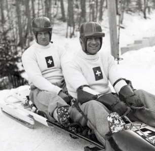 Bobsleeën, Olympische Spelen in Garmisch-Partenkirchen, Duitsland 1936. Foto: Het bobsleeteam Zwitserland II met piloot Fritz Feierabend en remmer Joseph Beerli. Zij zullen de zilveren medaille winnen.